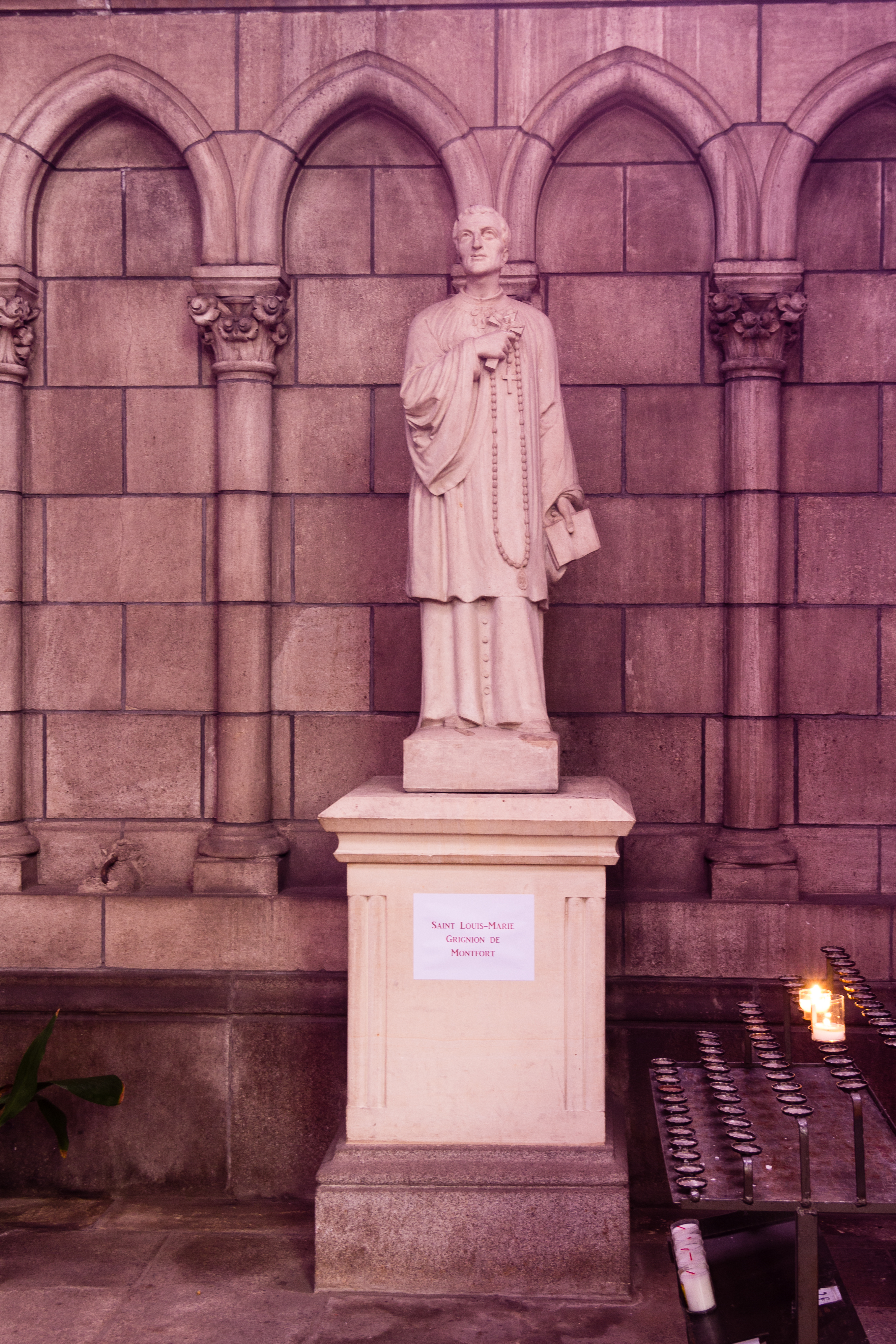 Statue de saint Louis-Marie Grignion de Montfort dans la chapelle à l'ouest du chœur de la basilique Notre Dame de Bonne Nouvelle de Rennes.